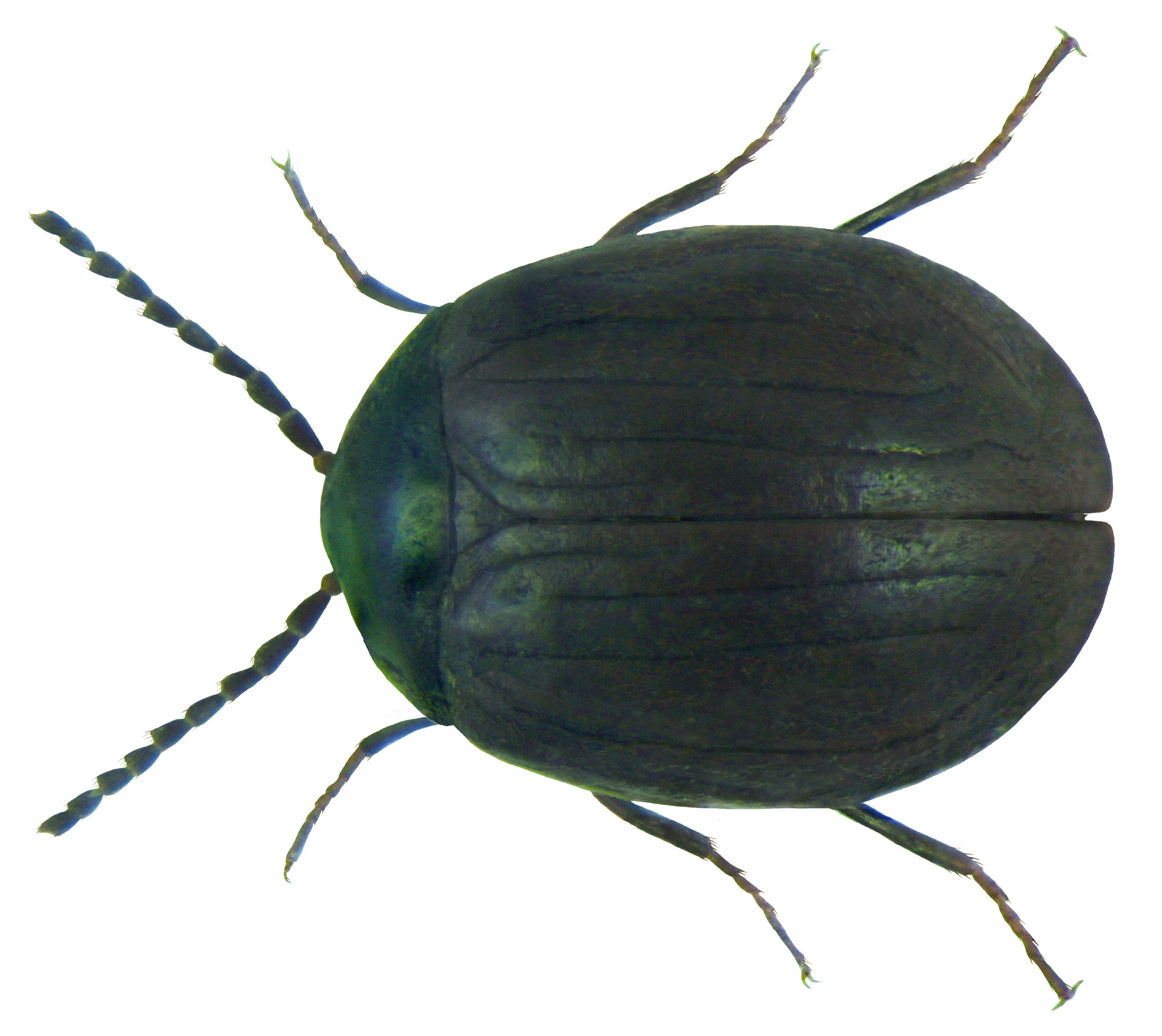 Familie: Psephenidae Groesse: 2,0-2,6 mm Verbreitung: Europa (ohne Skandinavien) Oekologie: an feuchten Orten Fundort: Germania, Oberbayern, Oberstdorf, Tiefenbach, 850 m leg. det. U.Schmidt, 2005 Photo: U.Schmidt, 2011